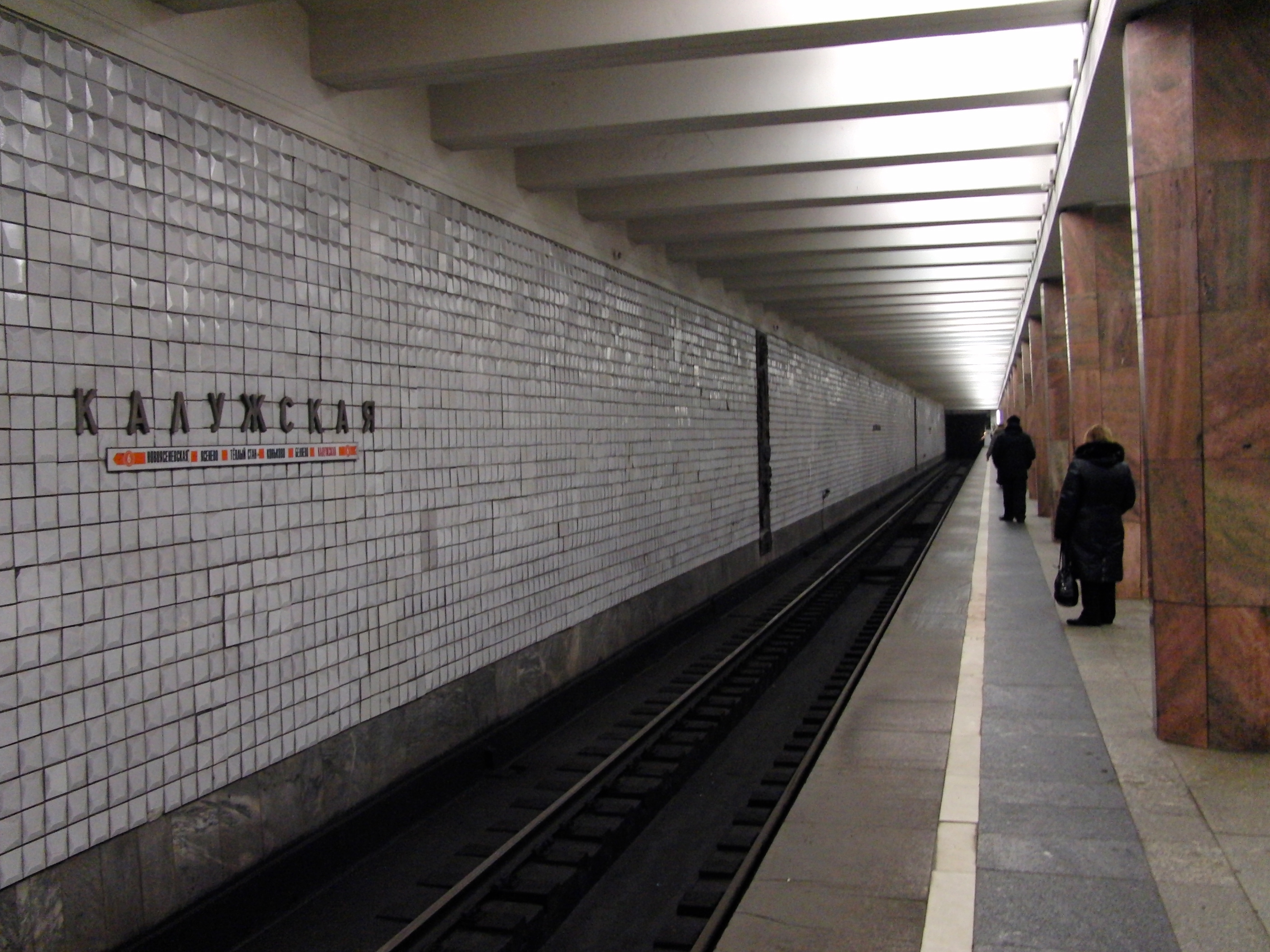 Kaluzhskaya (Калужская)